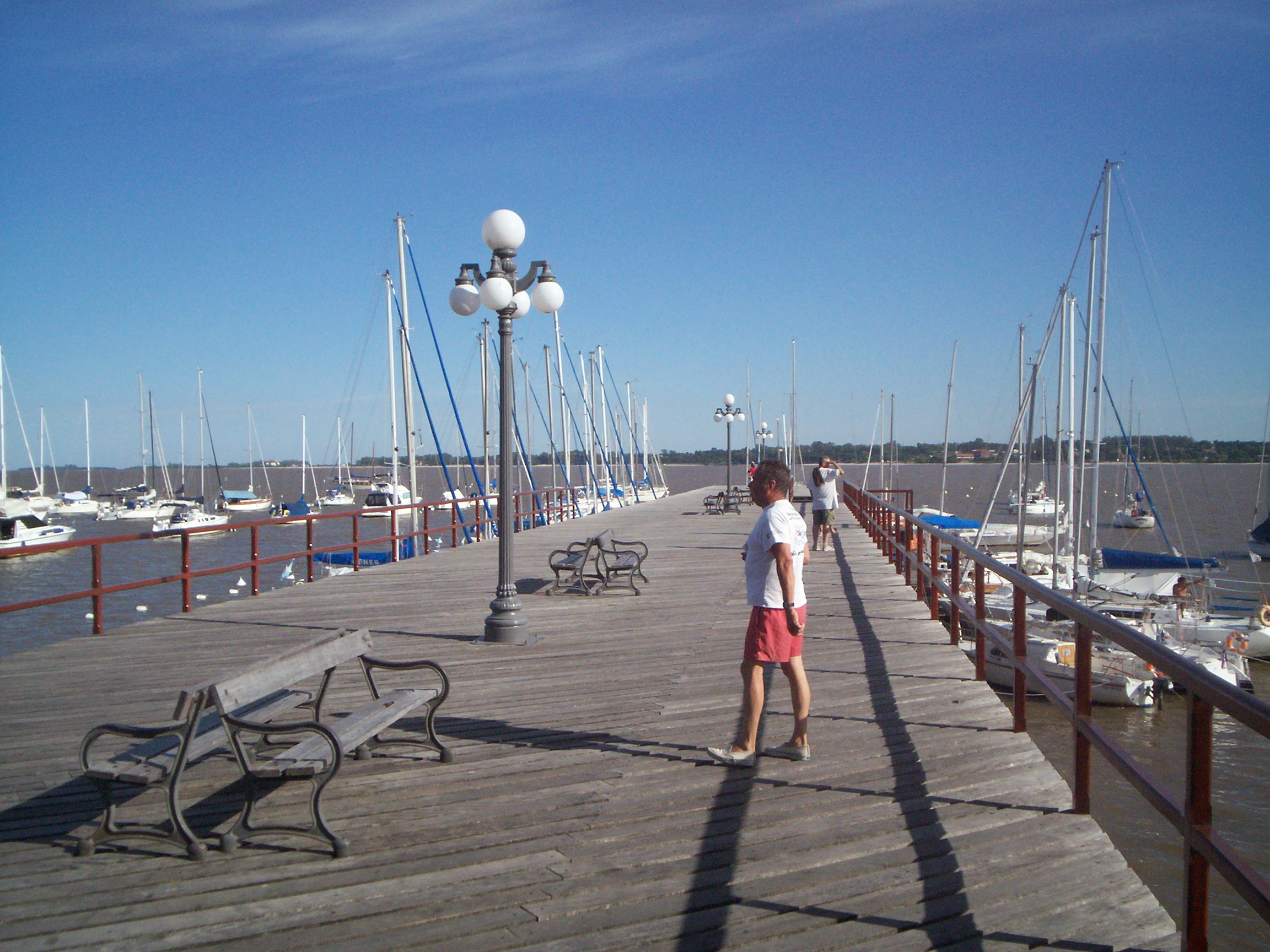 Imagen del muelle de madera de Colonia del Sacramento. Foto del 27 de noviembre de 2005.